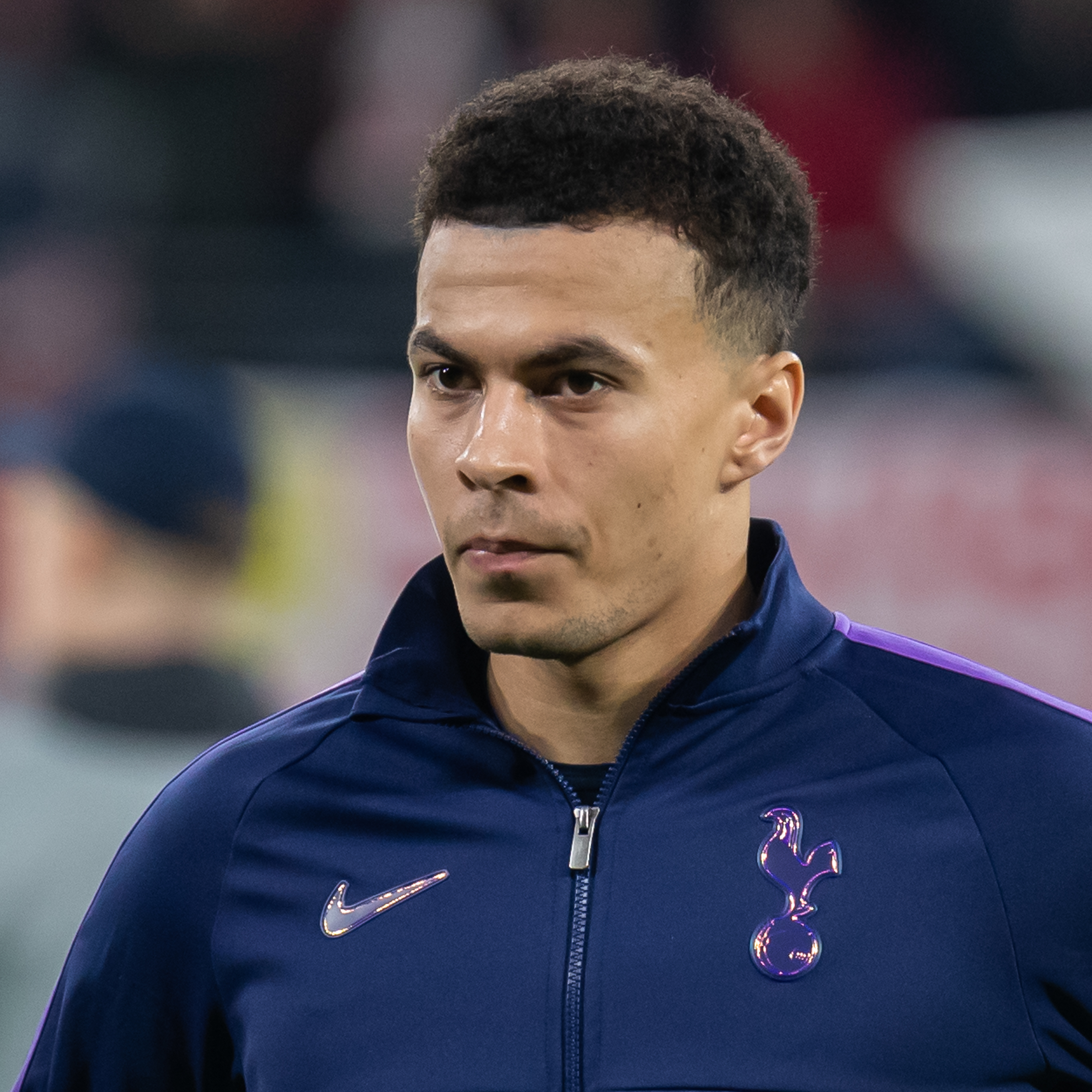 Fußball, Männer, UEFA Champions League Achtelfinale, RB Leipzig - Tottenham Hotspur; Dele Alli (Tottenham Hotspur, 20)